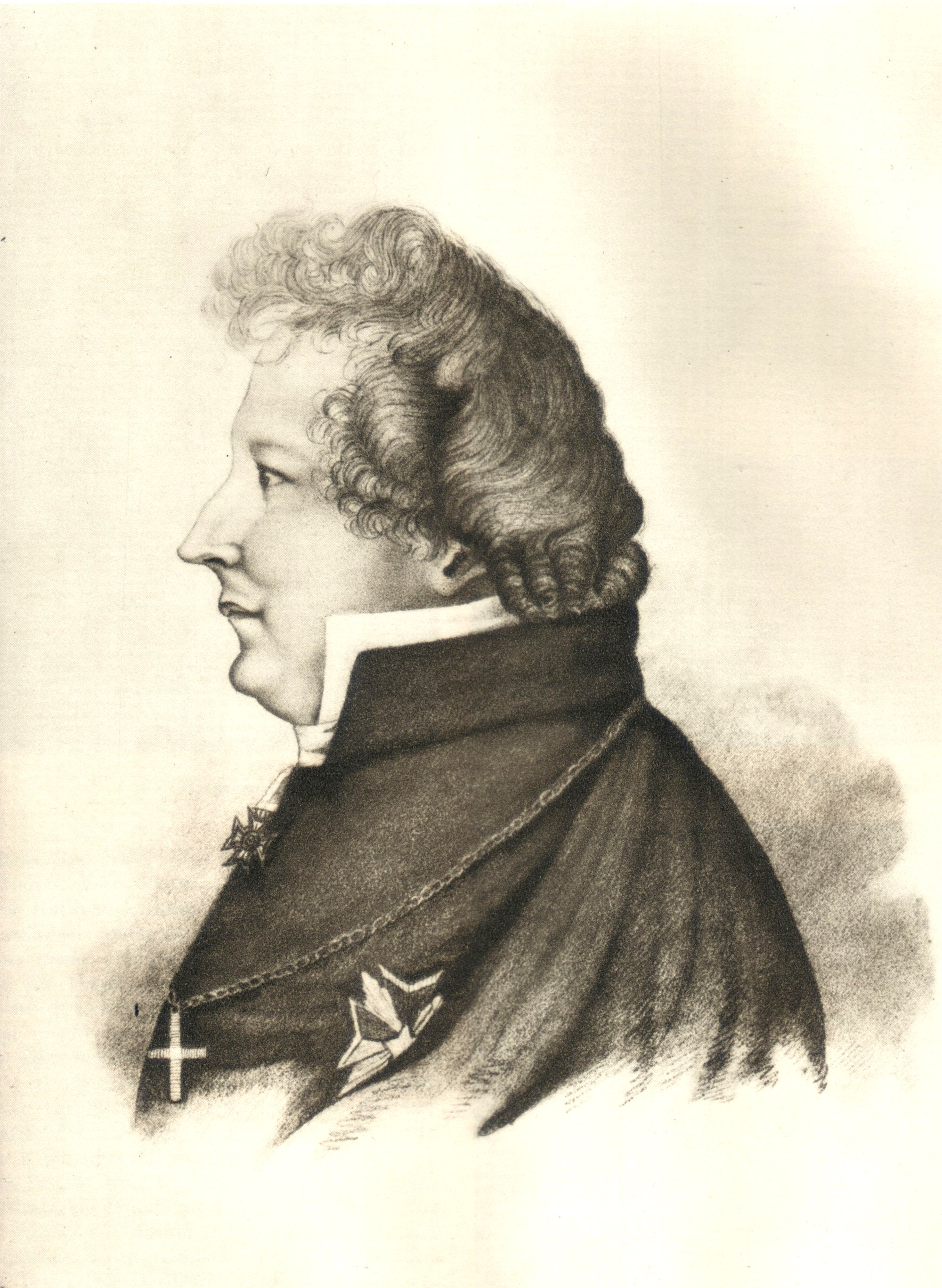 Esaias Tegnér (1782-1846), poet, biskop, riksdagsman.